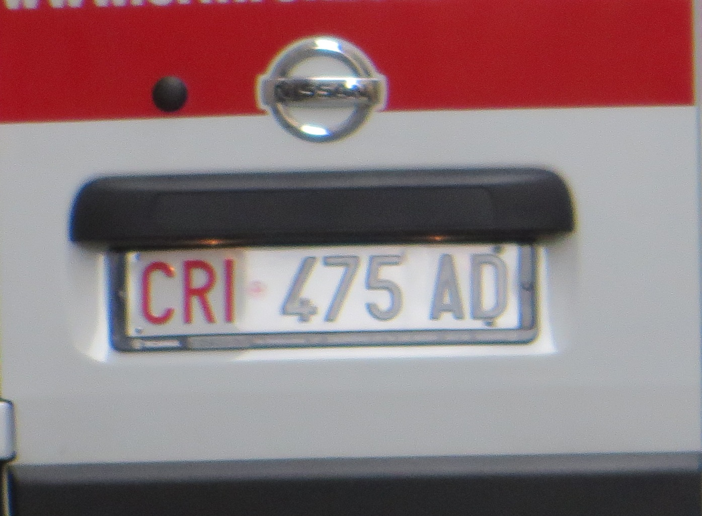 Italiaanse kenteken plaat ambulance